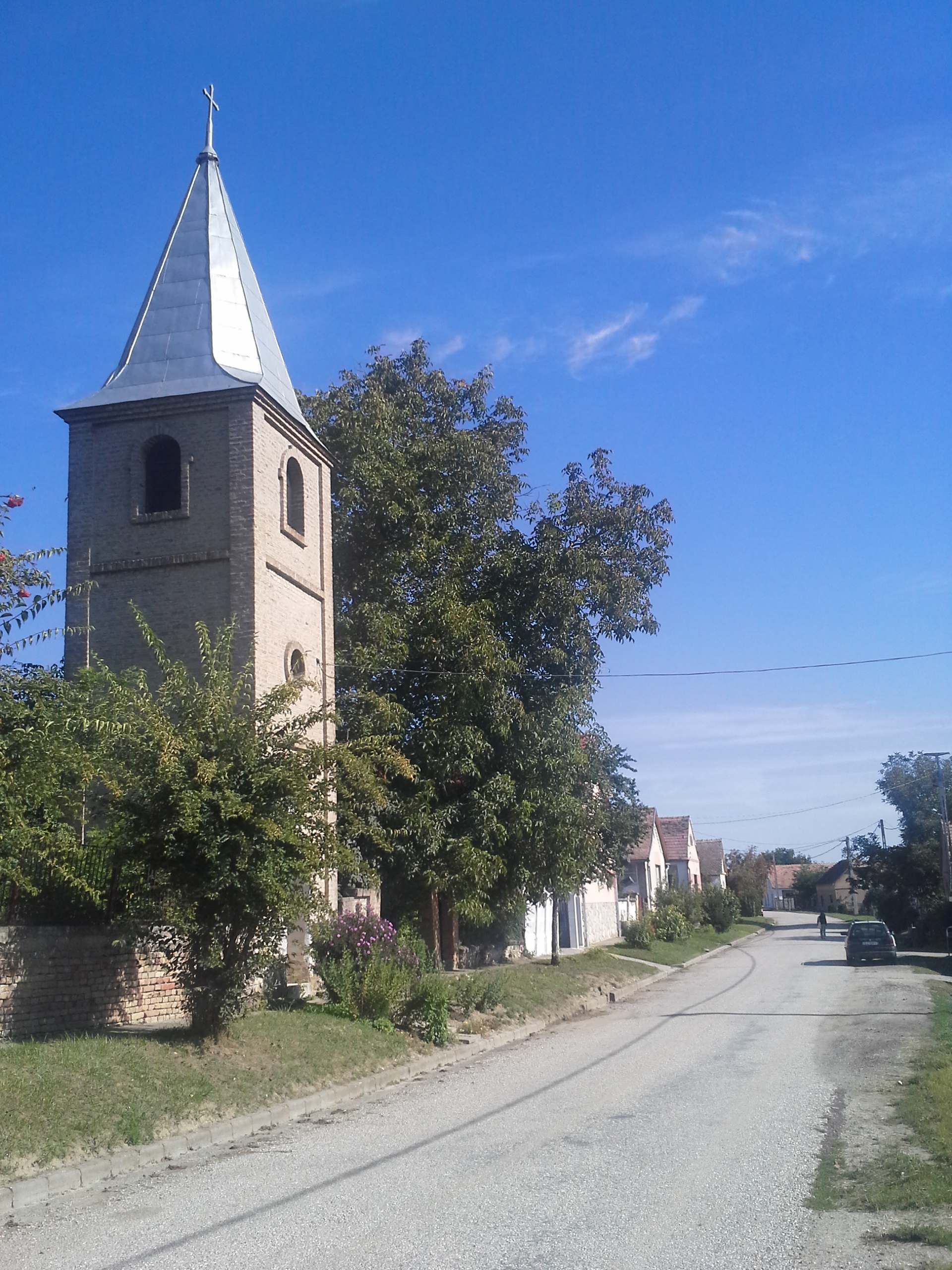 Átai harangtorony